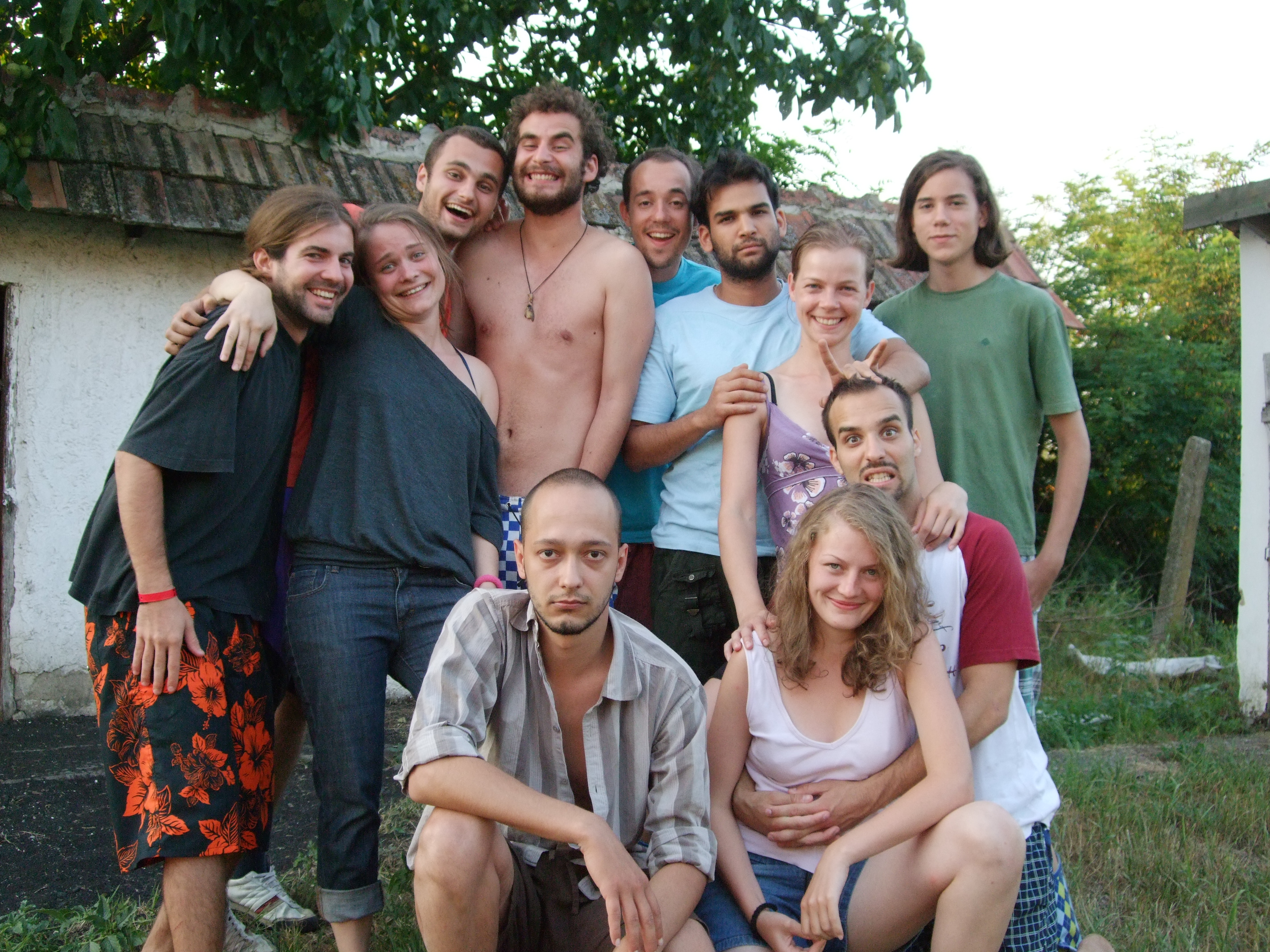 Az Erdélyi Vándorszínház társulata 2009-ben Tiszaszalkán